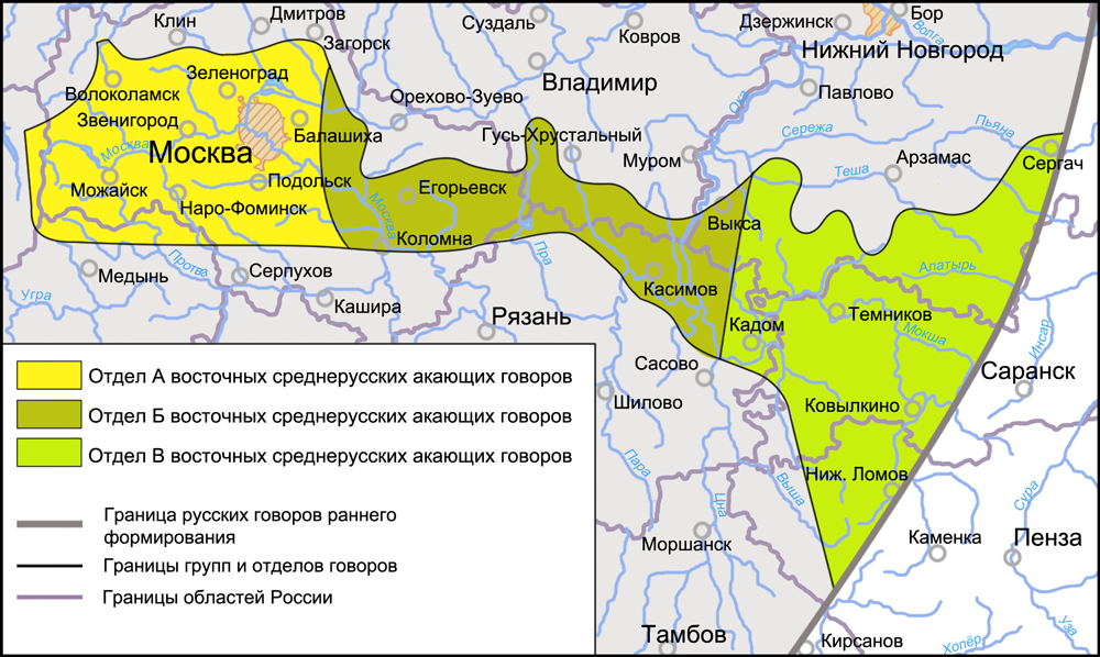 Территория распространения говоров отделов восточных среднерусских акающих говоров. Источники: Захарова К. Ф., Орлова В. Г. Диалектное членение русского языка — 2-е изд. — М.: Едиториал УРСС, 2004. — ISBN 5-354-00917-0, с. 166—167. Касаткин Л. Л. Русские диалекты. Лингвистическая география Русские. Монография Института этнологии и антропологии РАН — М.: Наука, 1999, с. 96. Федеральная целевая программа Русский язык. Региональный центр НИТ ПетрГУ